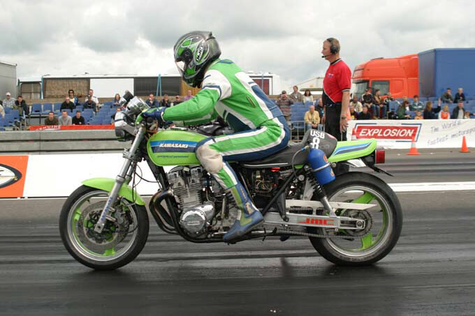 Foto met toestemming van Xavier Rincker